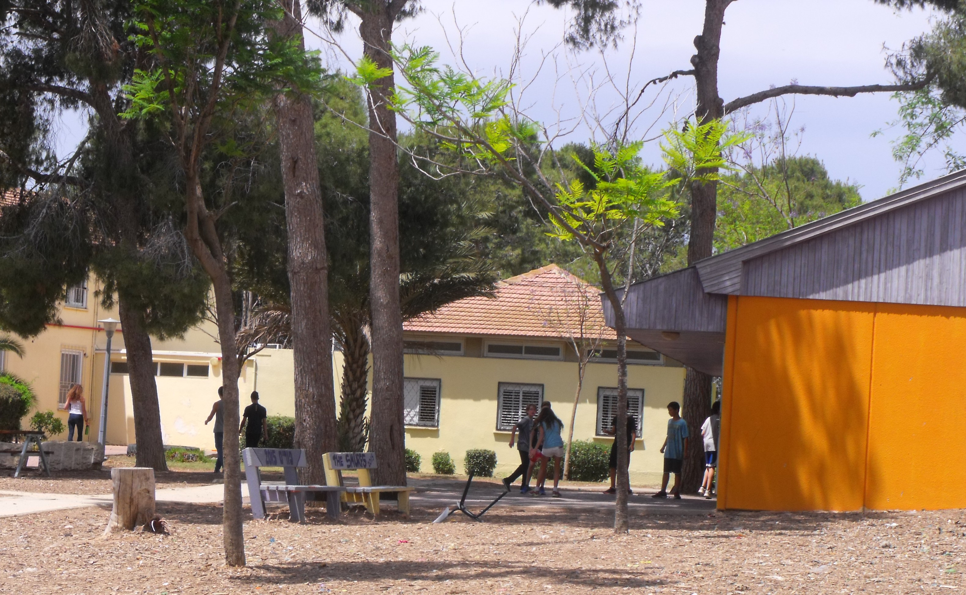 התלמידים בשוח בית הספר